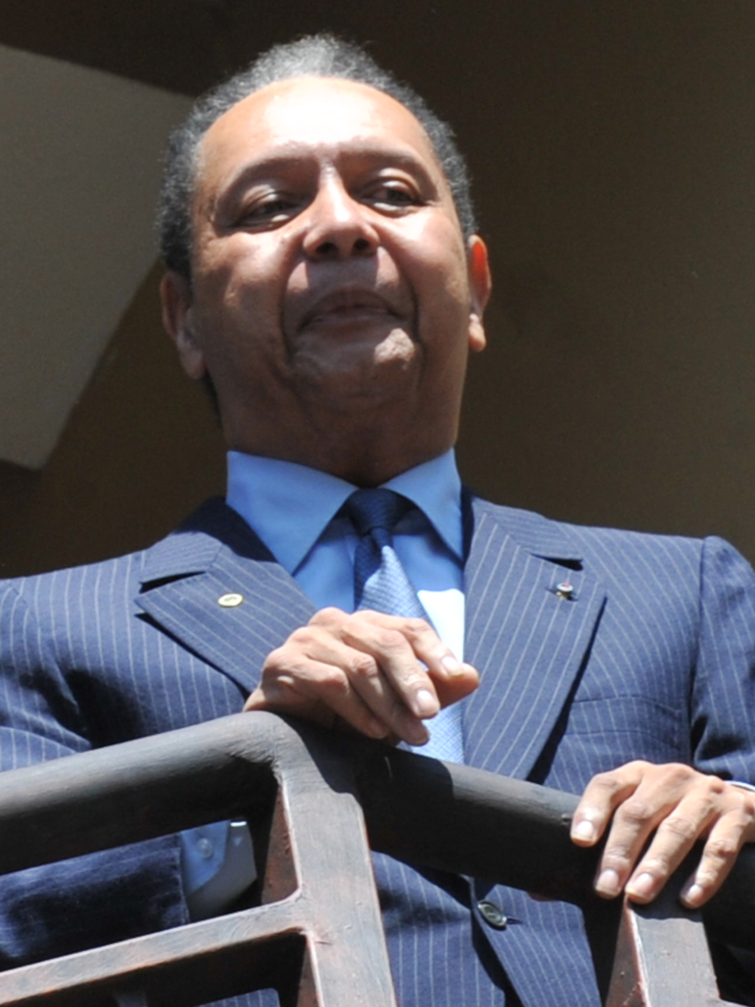 Photo re-centrée de Jean-Claude Duvalier à partir du fichier Baby Doc.jpg